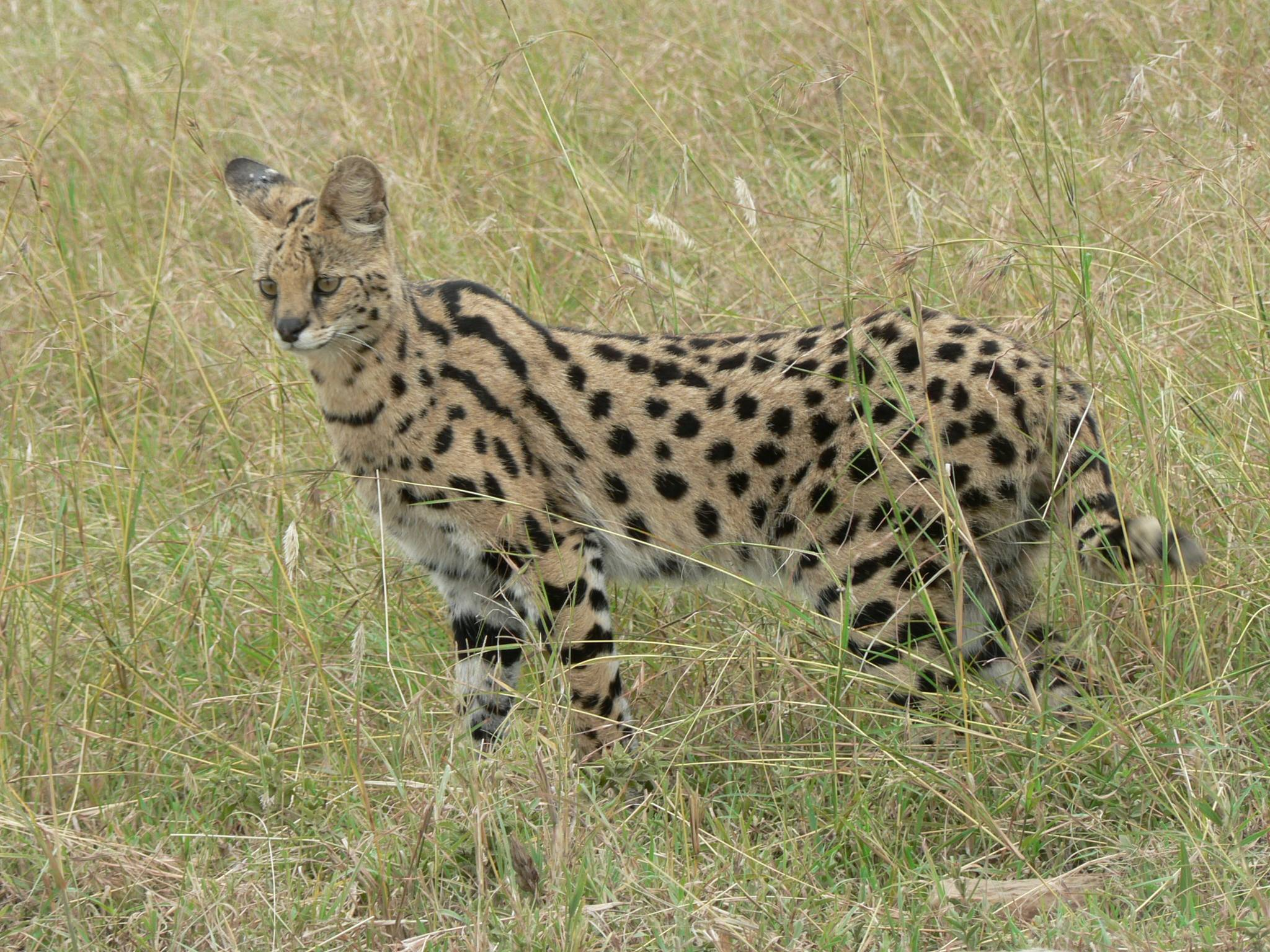 Leptailurus serval in Serengeti, Tanzania